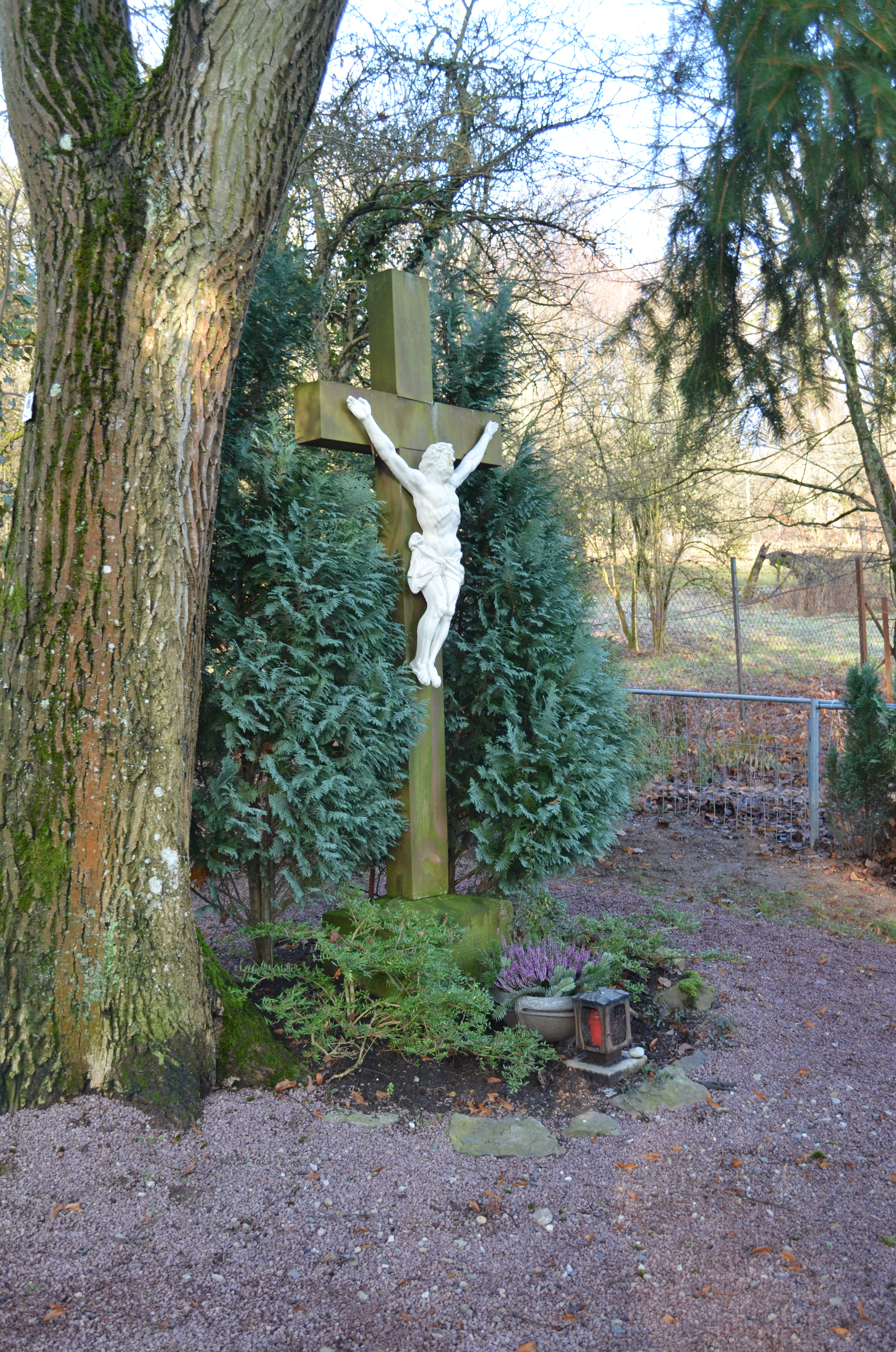 Königstein,Wegekreuz Romberg